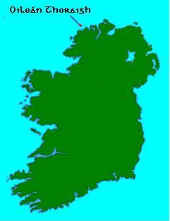 Suíomh.